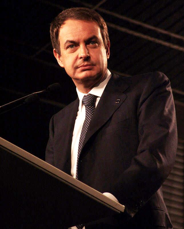 Zapatero en Cornellà del Llobregat